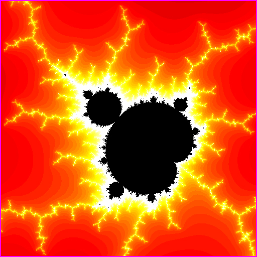 Imagen realizada por M.Romero Schmidkte ✉, especialmente para la Enciclopedia Libre y para la Wikipedia.